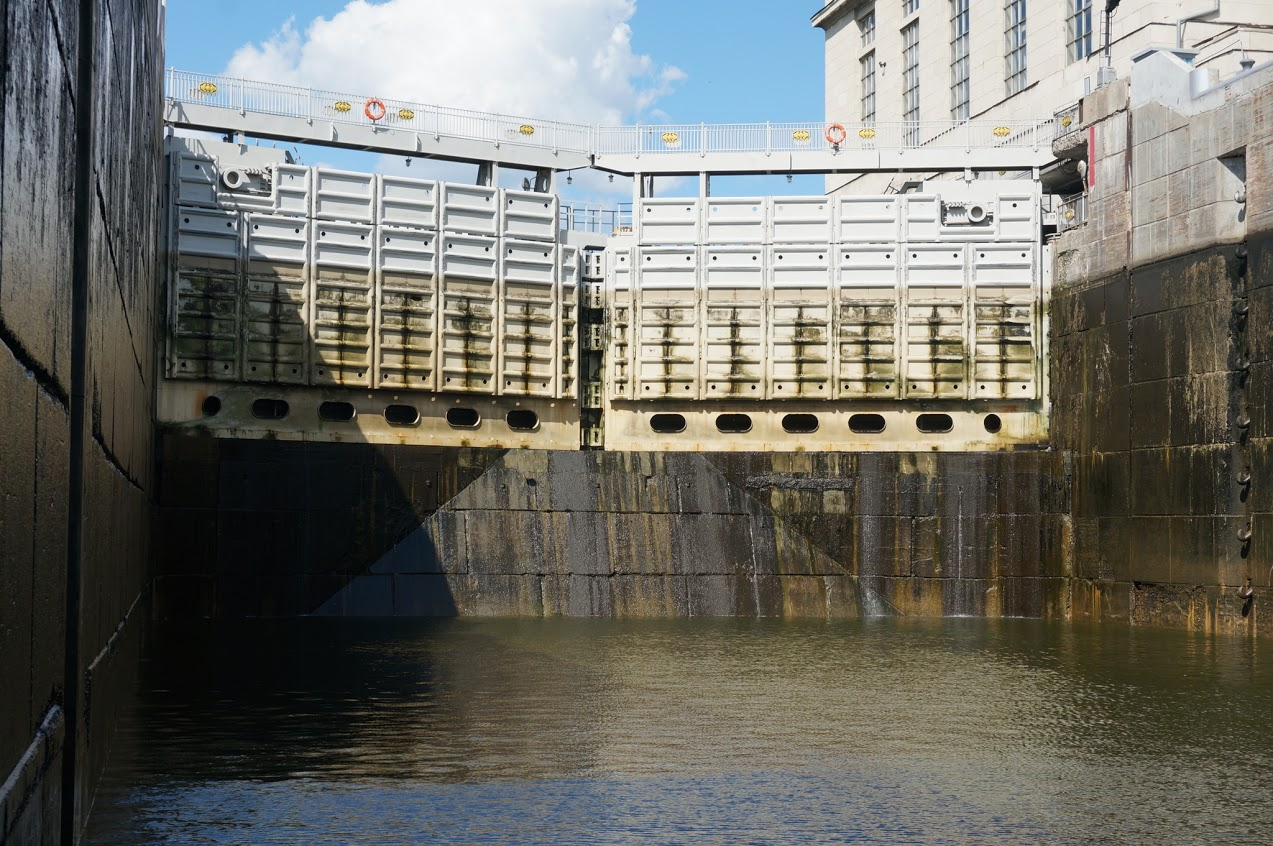 Верхние ворота и камера шлюза № 24 по Волге. Нижний каскад шлюзов Жигулёвской ГЭС. Вода на уровне нижнего бьефа